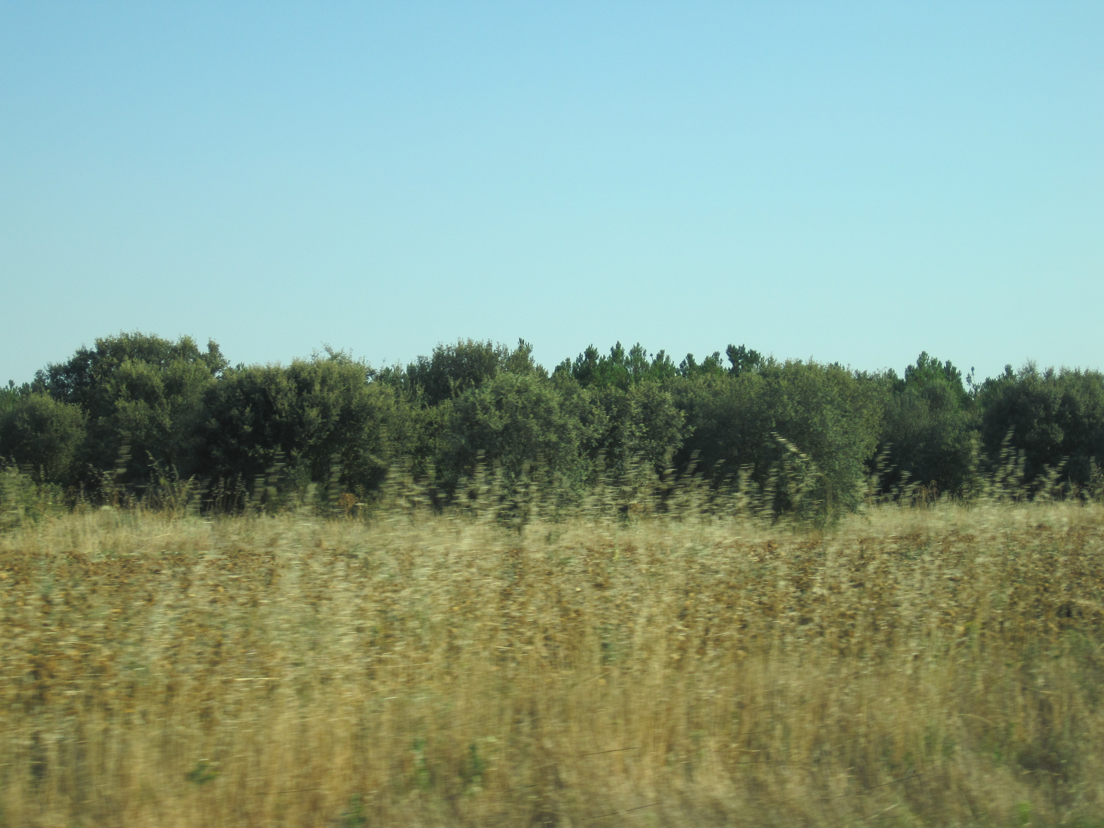 Encinar situado en las cercanías de Fontecha del Páramo.